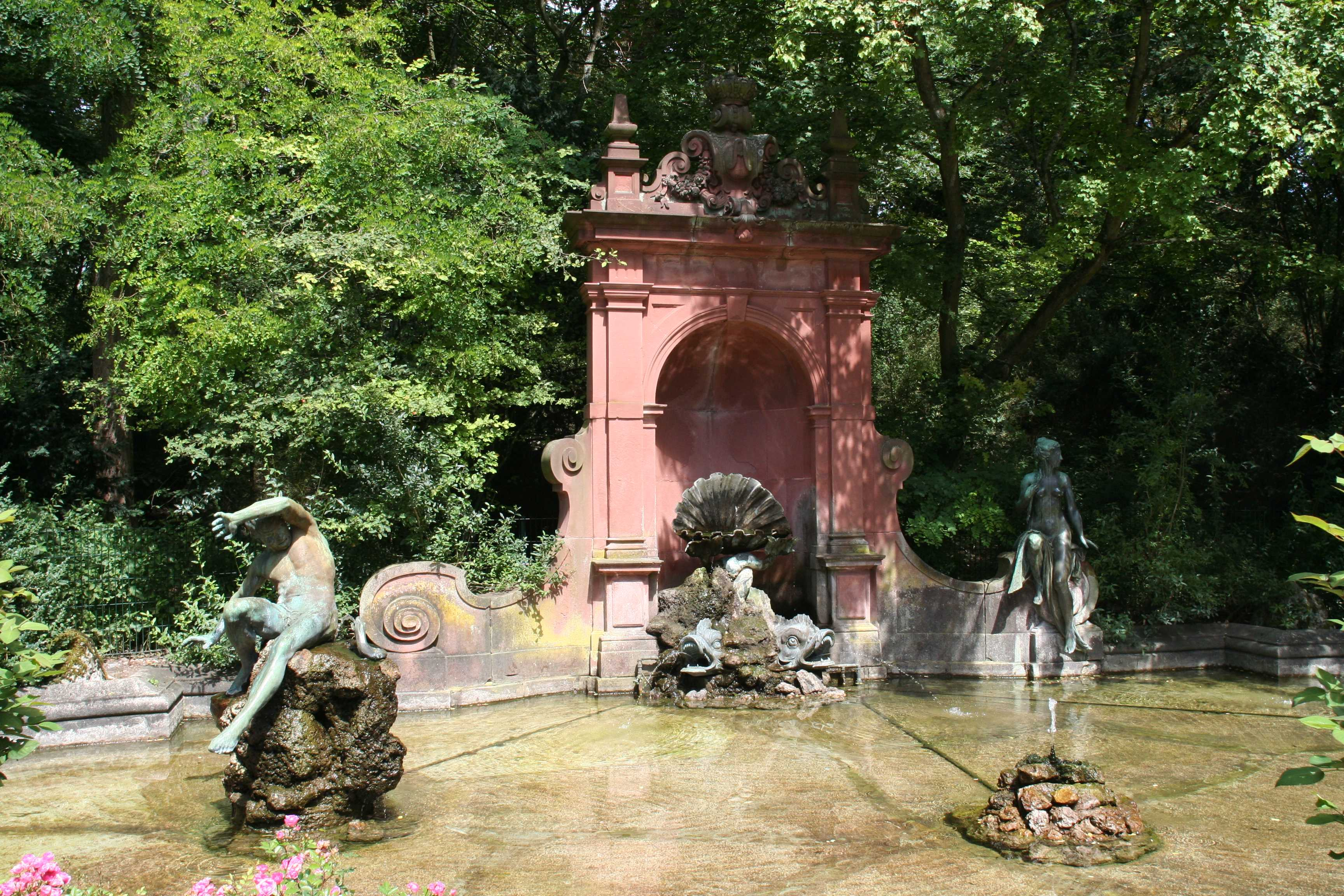 Herzog-Alfred-Brunnen im Coburger Hofgarten. Die beiden Figuren stammen August Sommer, links „Schreck“ und rechts „Idylle“.